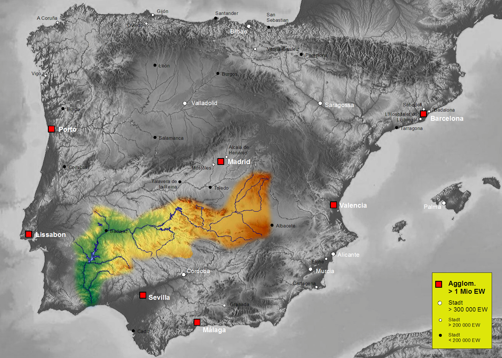 Map of Guadiana river basin in Spain, Karte des hydrogeografischen Beckens des Guadiana